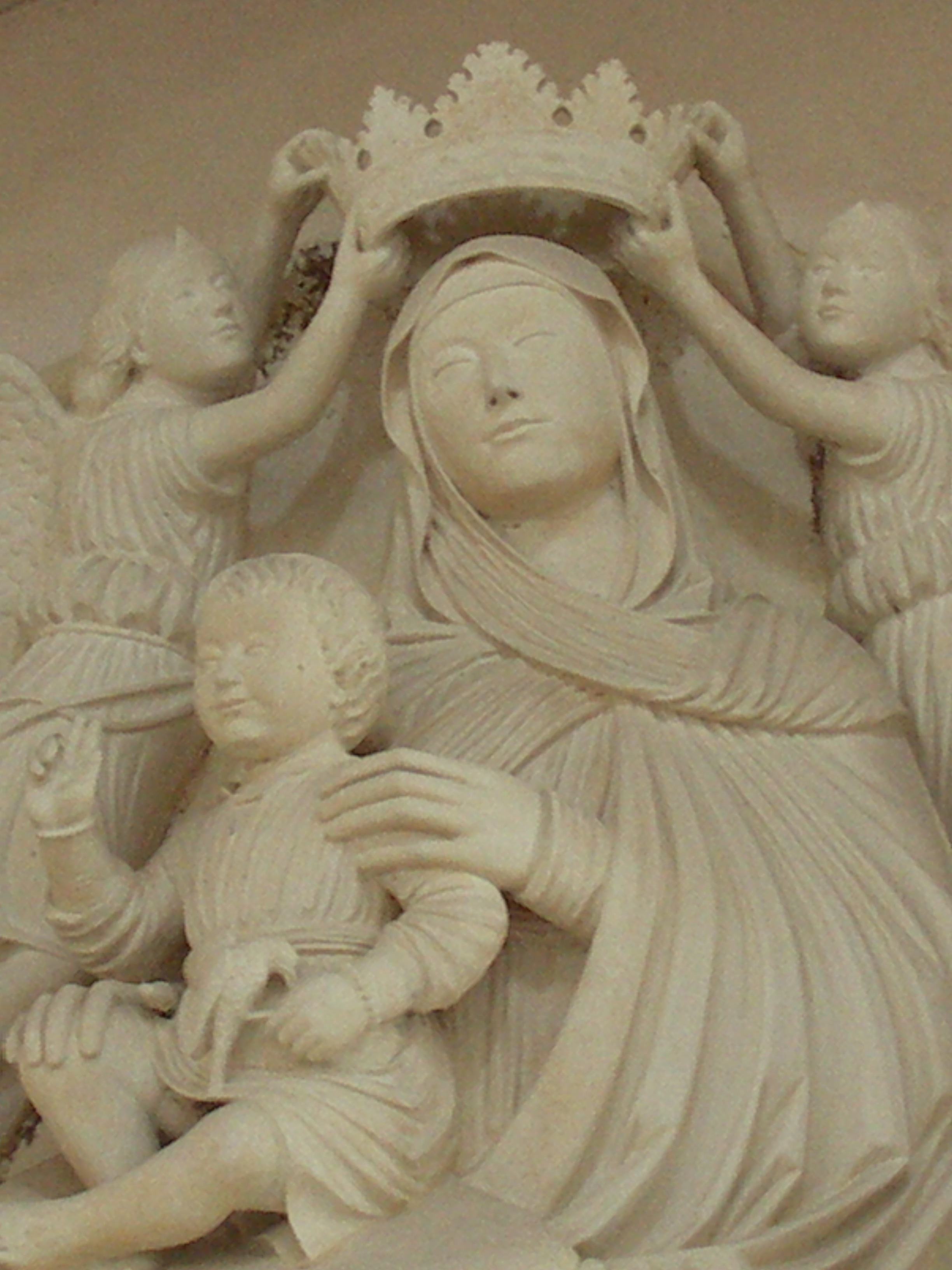 Cisternino (Brindisi), Chiesa Matrice di San Nicola, Scultura di Santa Maria di Costantinopoli (1517); alla base del bassorilievo è incisa la frase "Colui che mi ha tratto dalla pietra nel 1517 è Stefano di Putignano di Puglia"